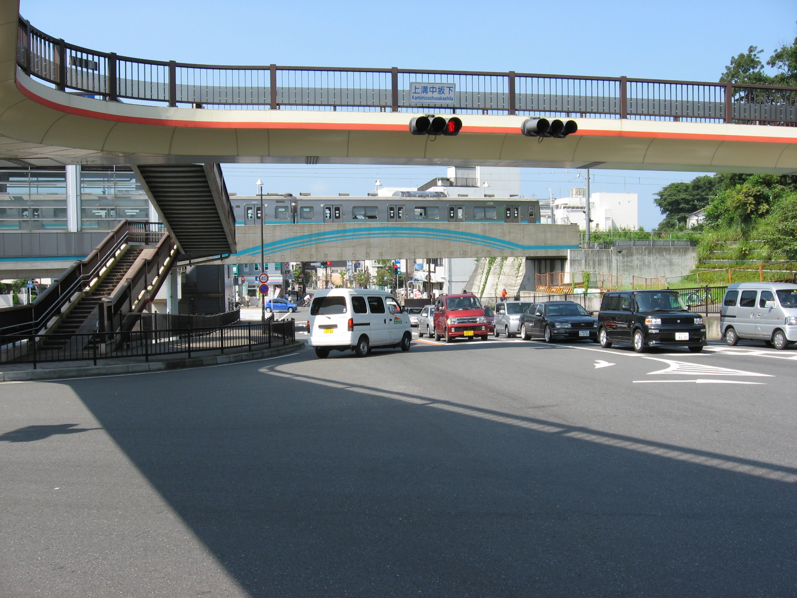 神奈川県道57号線 上溝駅付近